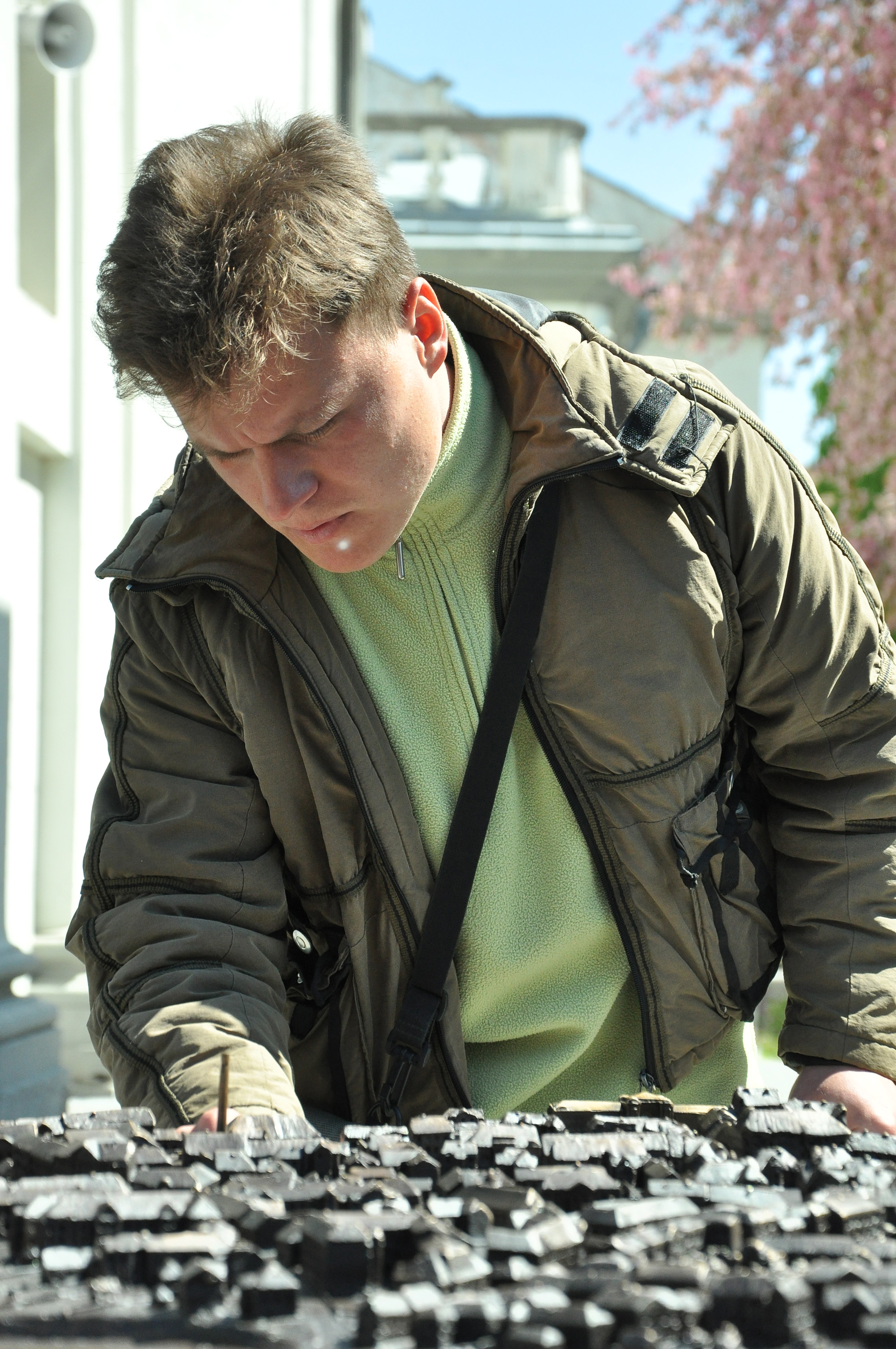 Український краєзнавець, екскурсовод, музикант Тарас Циклиняк біля макету довоєнного Тернополя.